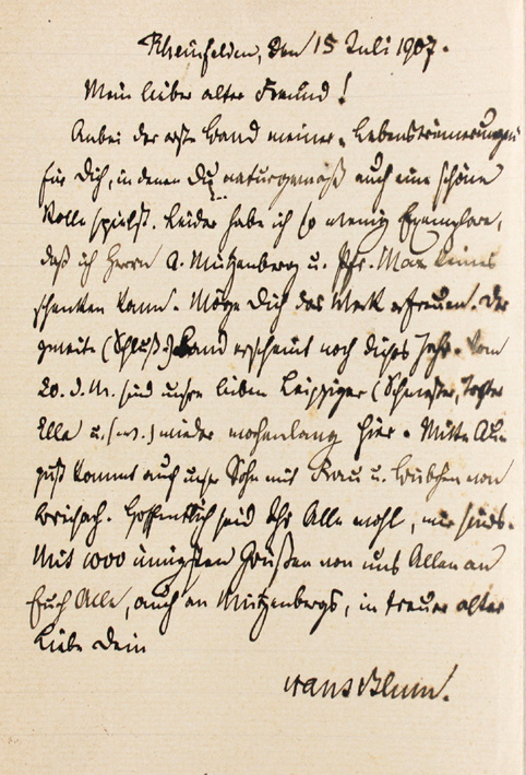 Hans Blum, Brief an Friedrich Prechtel, datiert Rheinfelden 15. Juli 1907.